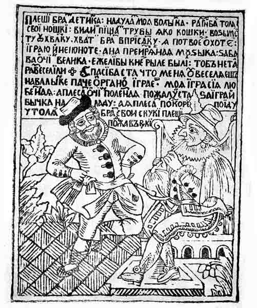 Плясун и скоморох Лубок